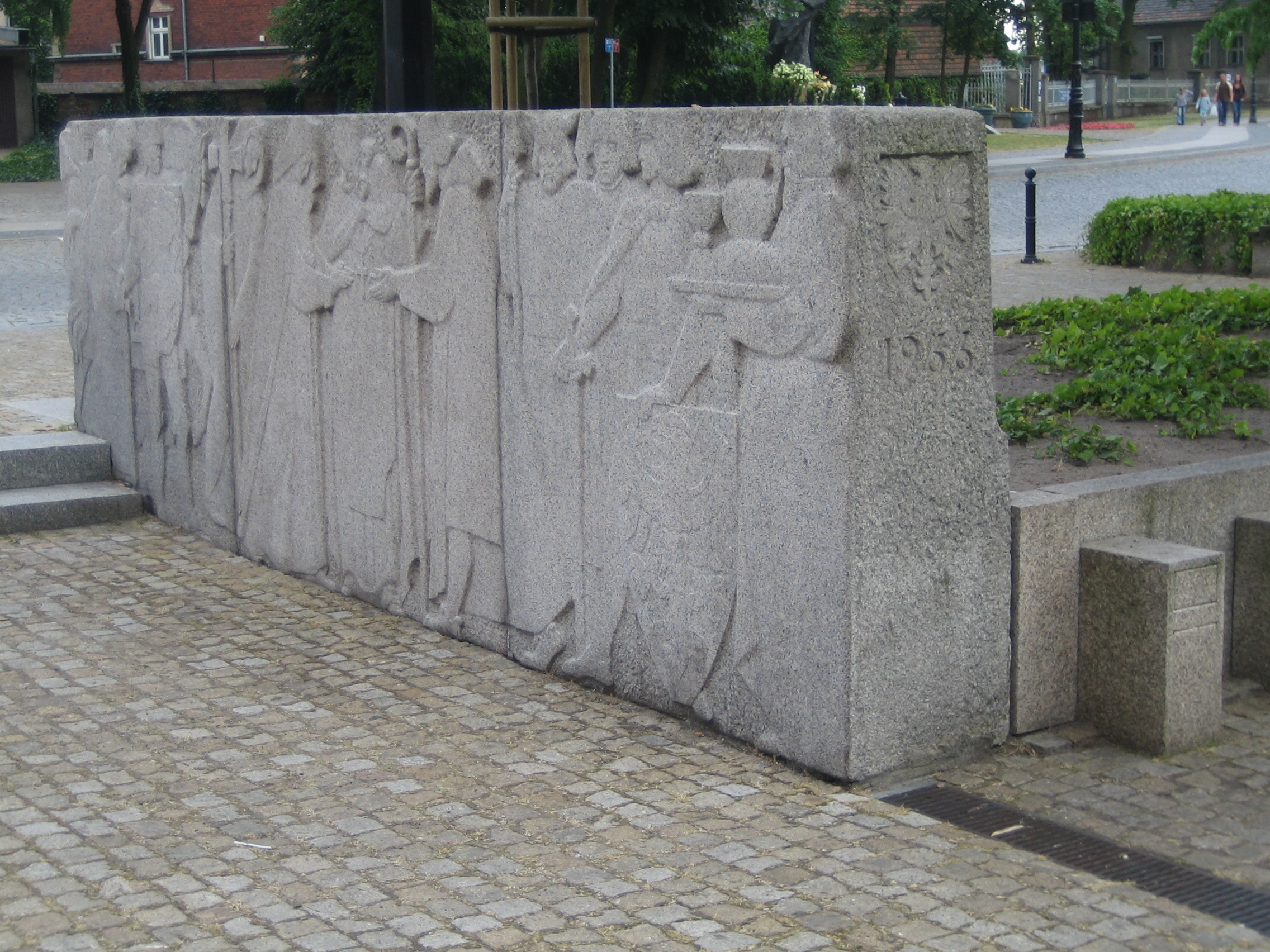 Pomnik "Tysiąc lat chrztu Polski" autor Kazimierz Bieńkowski , plac przed Katedrą w Poznaniu (cz.1)